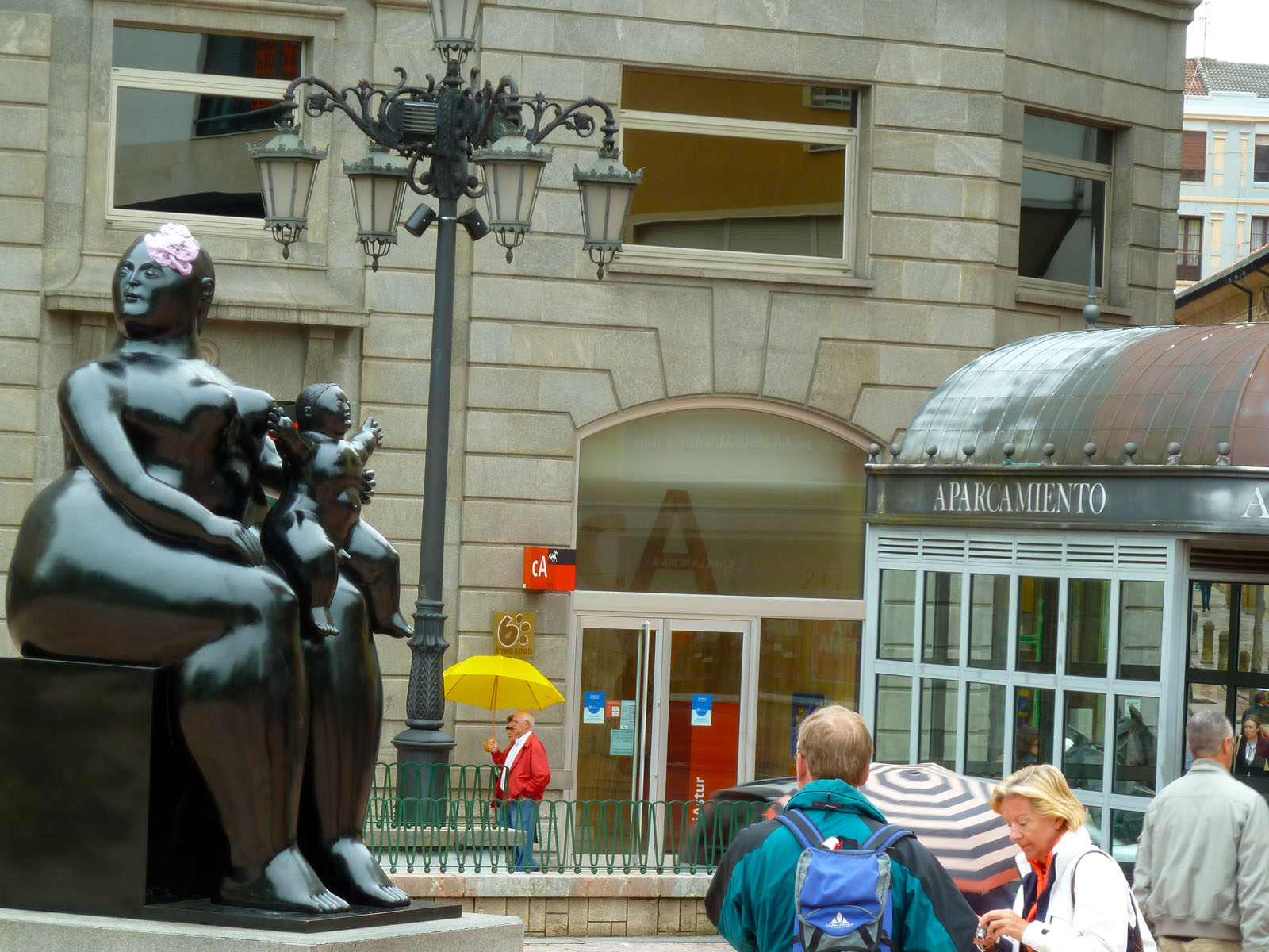 Botero